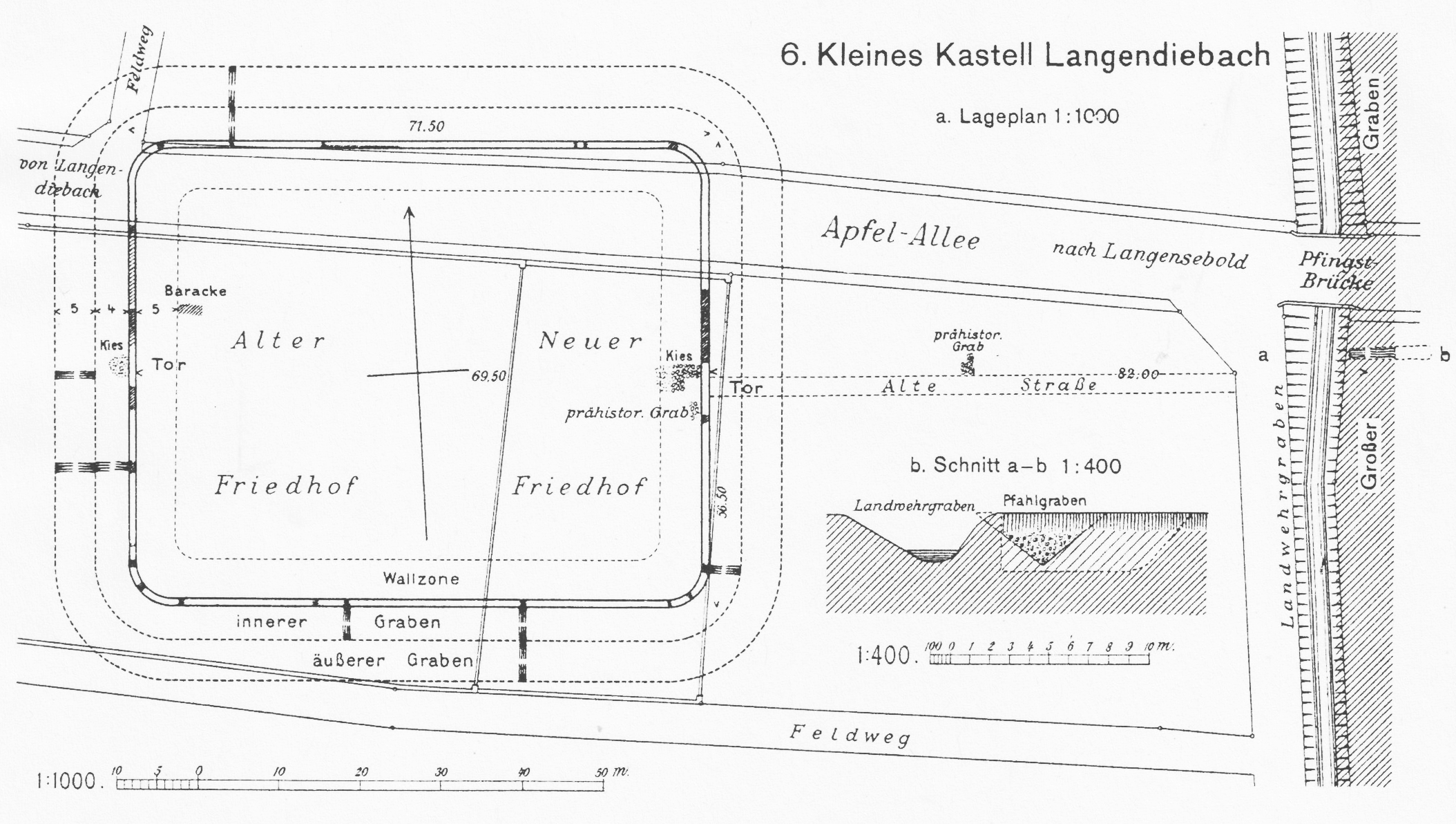 Kleinkastell Langendiebach am ORL (Publikation Limesblatt 14/1895 (12. April) Spalten 893-895).